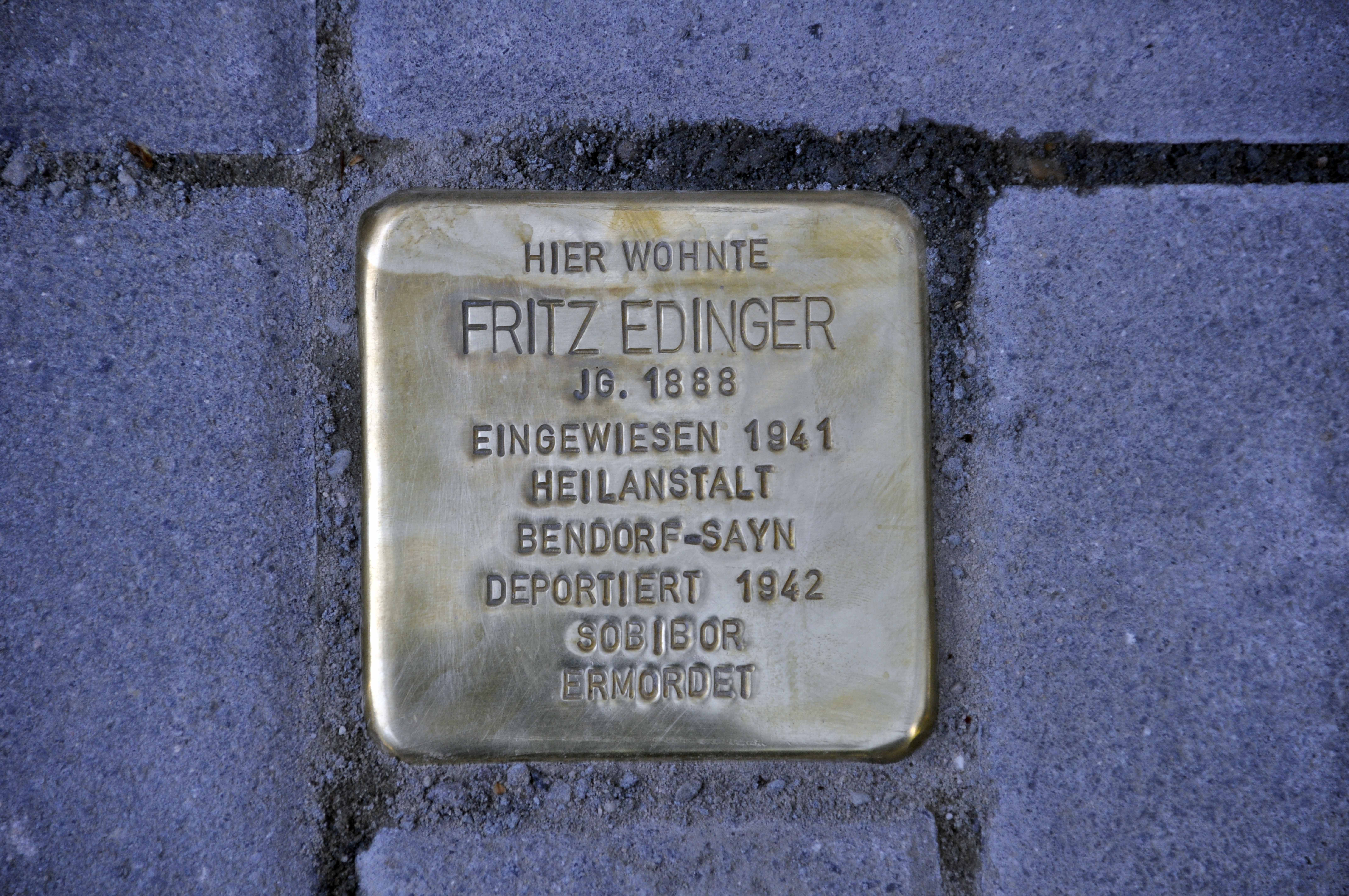 Stolpersteine Gärtnerweg 51 Fritz Edinger